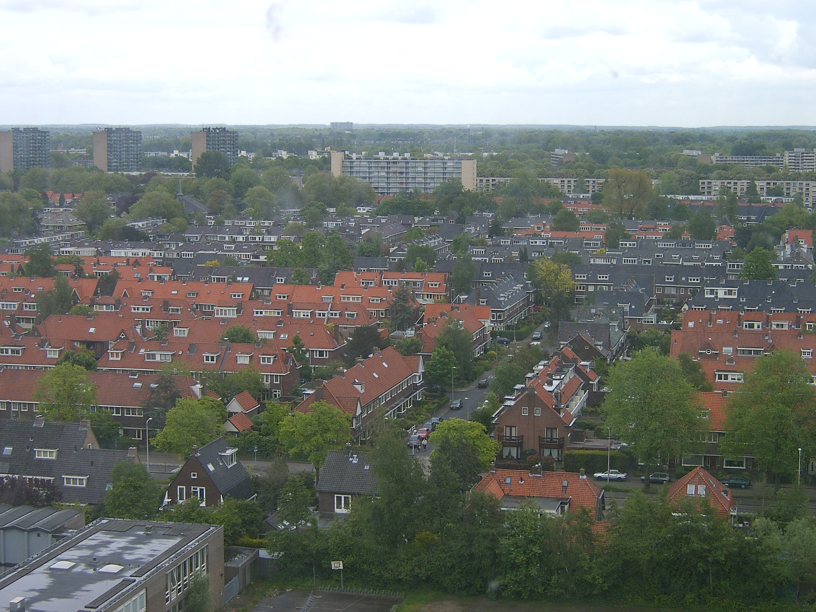 eigen werk Ruben Alexander